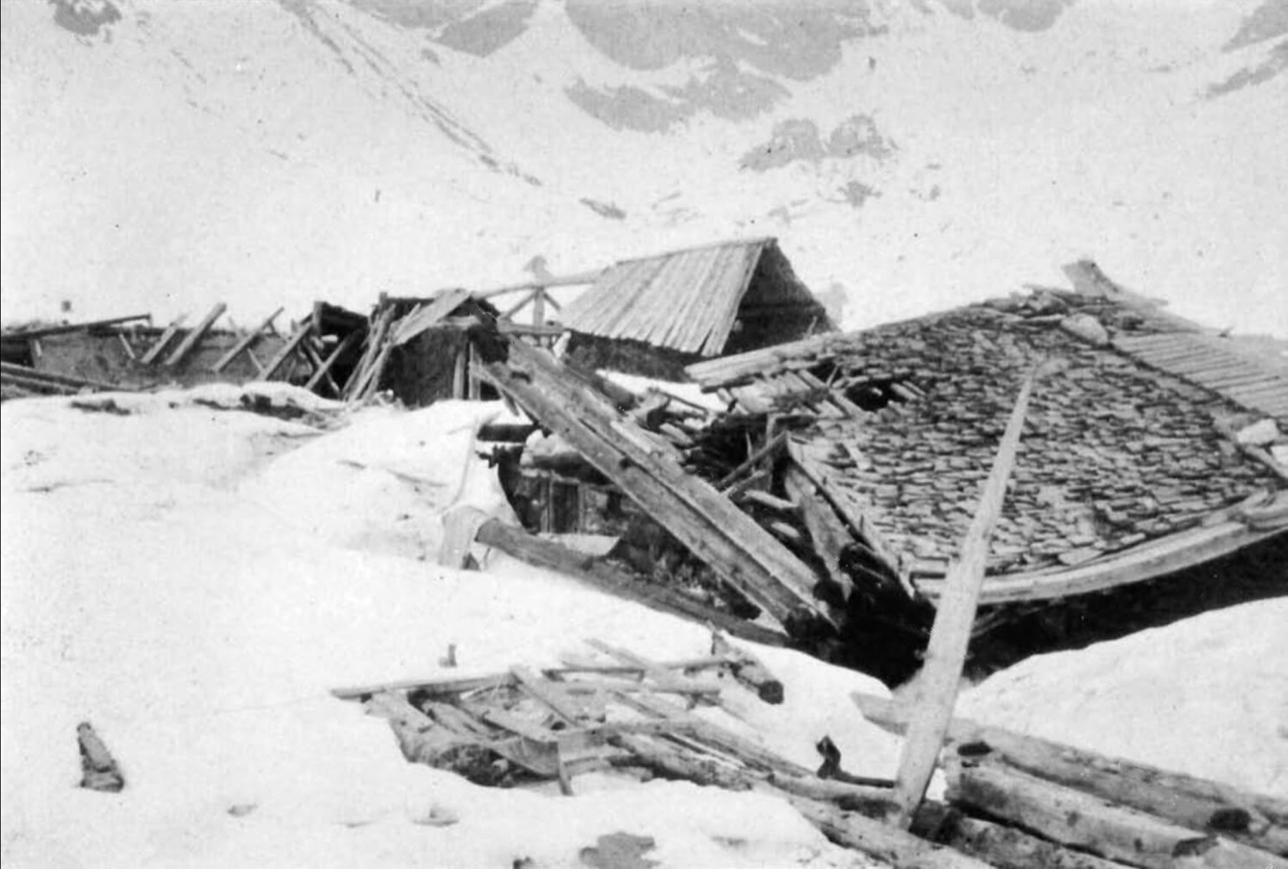 Baracche distrutte da valanga nella conca di Fuchiade (9 marzo 1916)